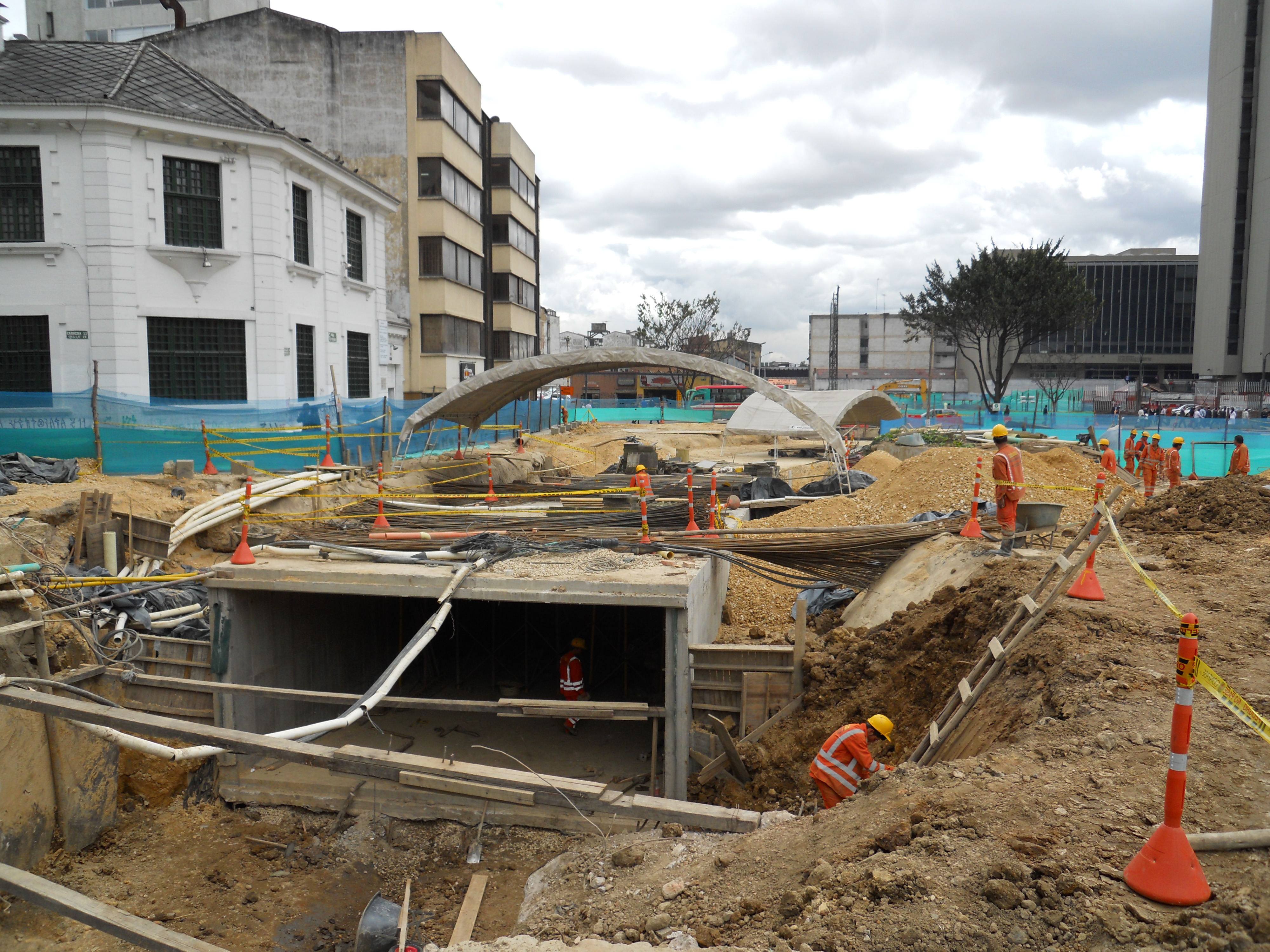 Obra de Transmilenio, fase III, en la carrera 13 A con calle 26.